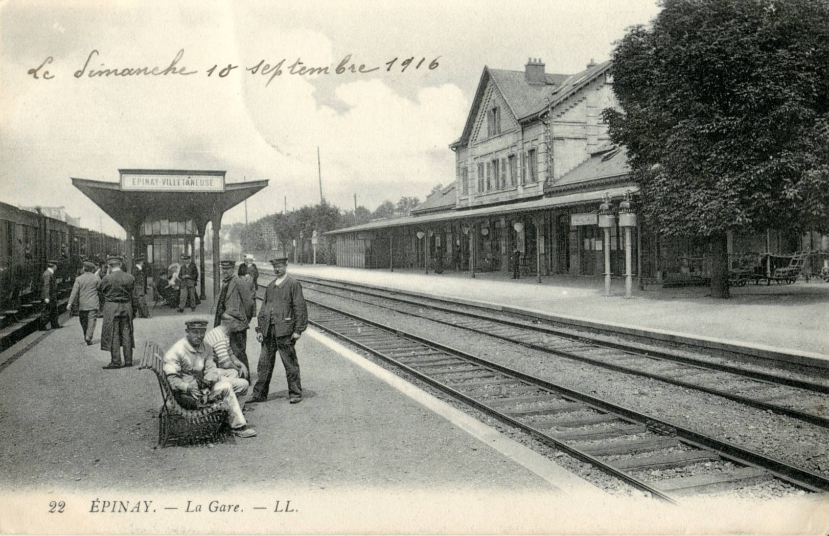 Carte postale ancienne éditée par LL, N° 22 EPINAY : La gare (d'EPINAY-VILLETANEUSE)